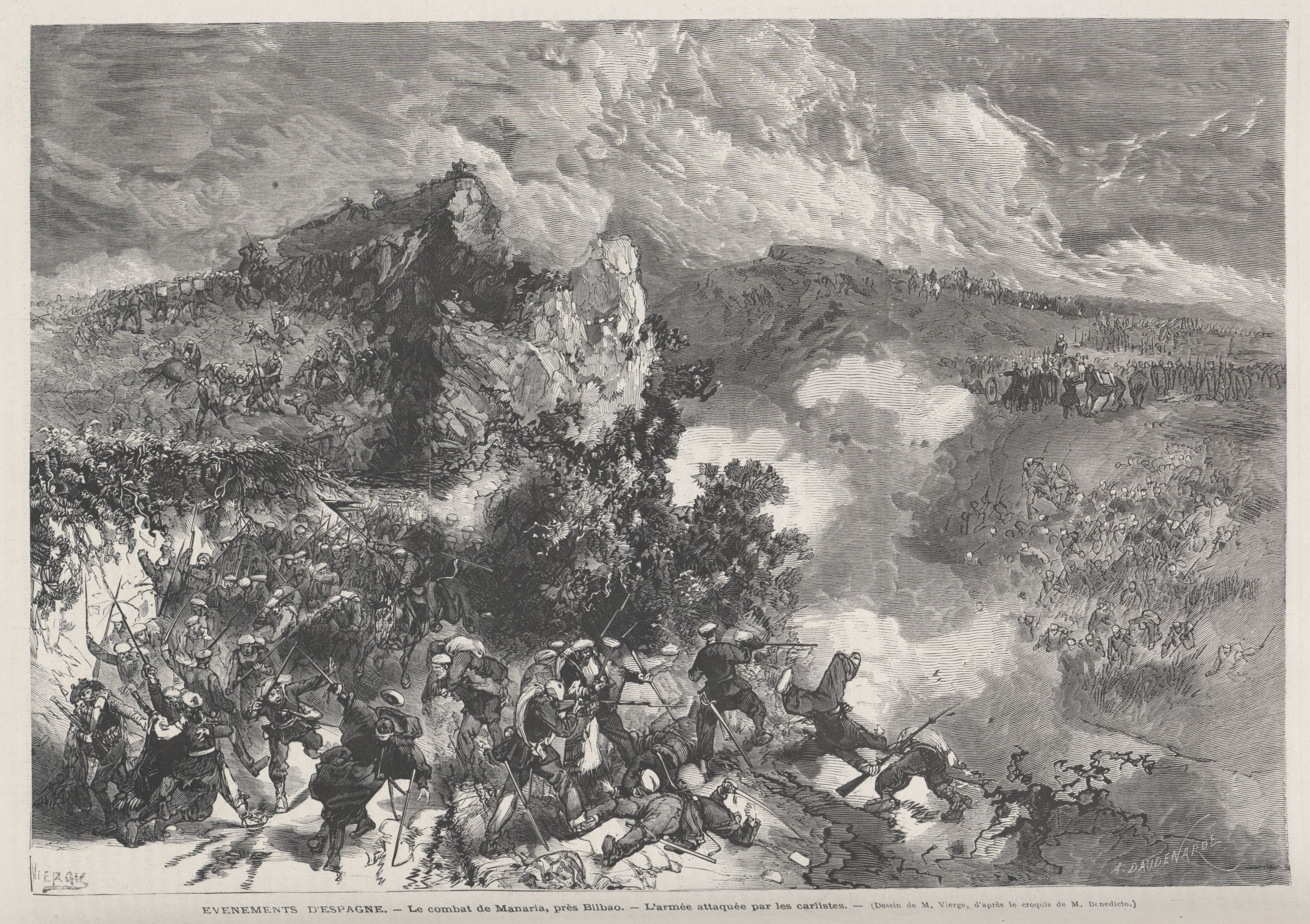 Le combat de Mañaria, près Bilbao - L'armée attaquée par les carlistes, de Daniel Urrabieta Vierge, en la revista Le Monde Illustré.